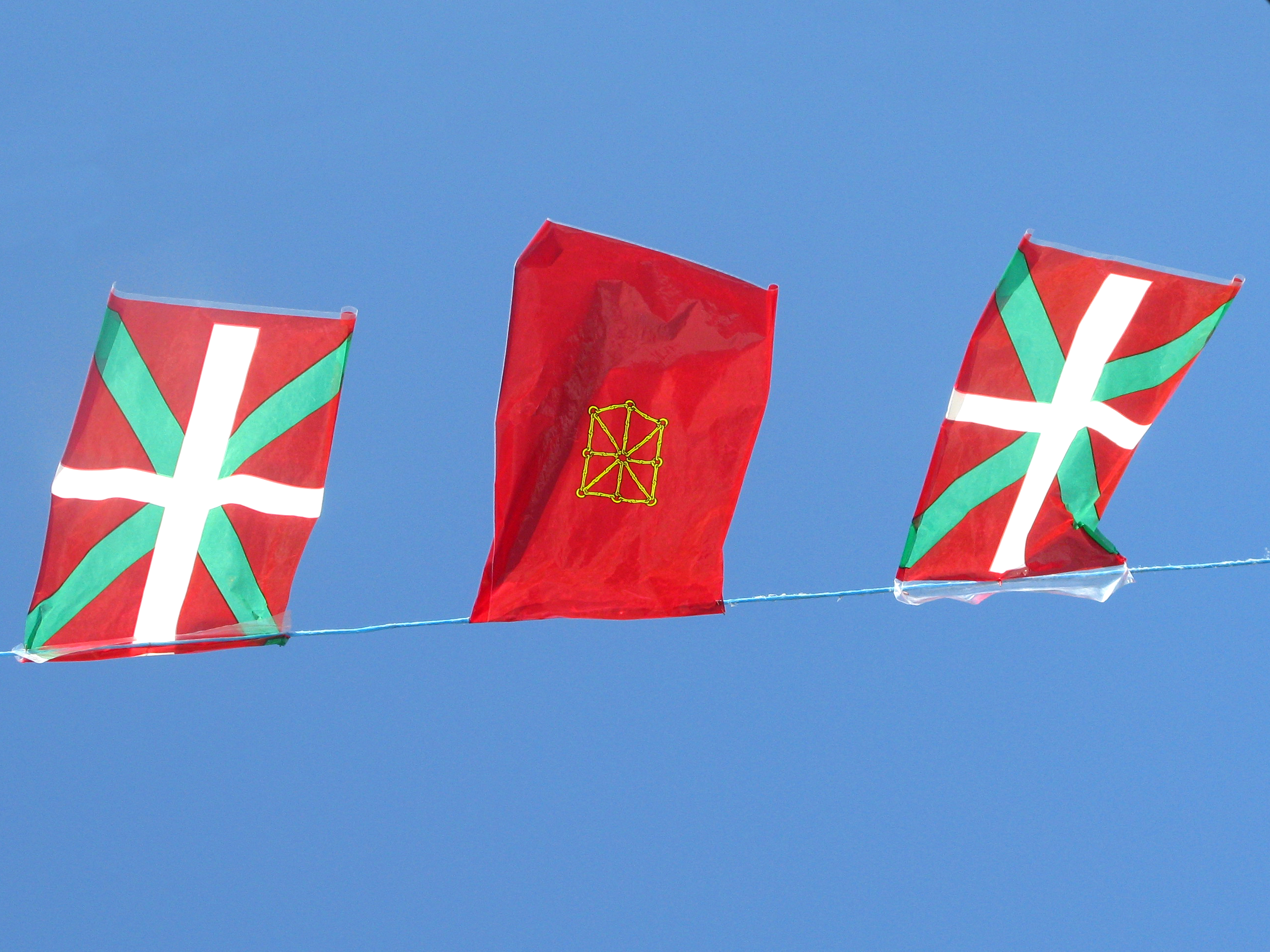 Basque Flags